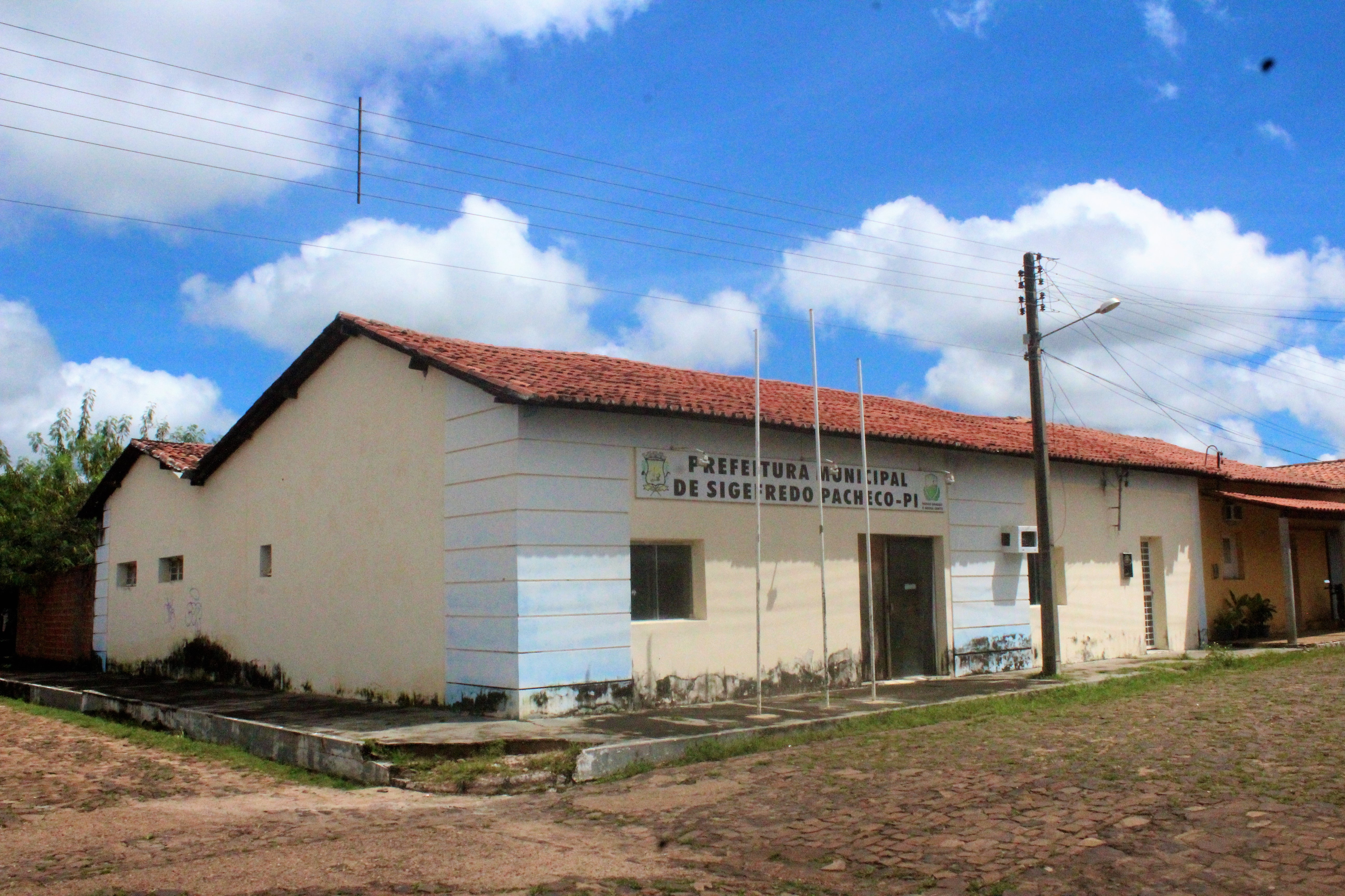 Biblioteca Municipal de Sigefredo Pacheco (Piauí),instalada na antiga sede da prefeitura do município.